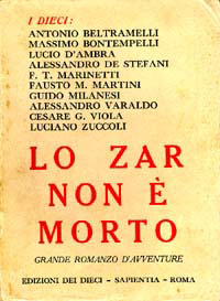 Copertina del romanzo di AA VV Lo zar non è morto - Grande romanzo di avventure, Edizioni dei Dieci, Sapientia, Roma, 1929